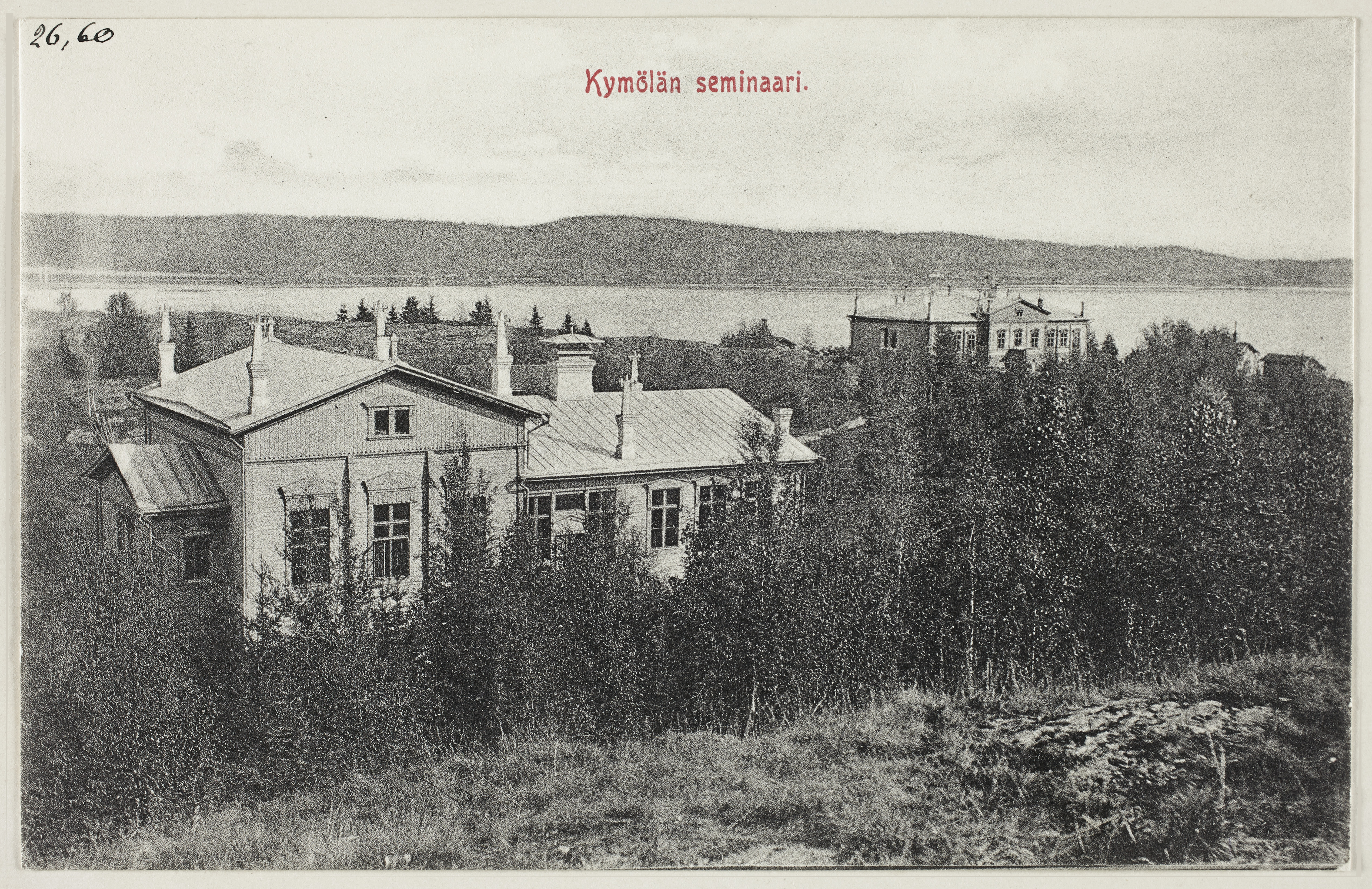 Karjalan Kirjakauppa- ja Kustannusliike, tuottaja 1900–1929 vaaka, mustavalkoinen, ei painolaatuinen Kuvan käyttöoikeudet: CC BY 4.0 Kuva on julkaistu Nimeä 4.0 Kansainvälinen (CC BY 4.0)-lisenssillä. Verkkopalvelussa julkaistua näyttökuvaa voi käyttää vapaasti myös kaupallisessa käytössä. Kuvan yhteydessä on mainittava tekijä ja/tai kuvaaja sekä säilyttävän organisaation ja kokoelman nimi.